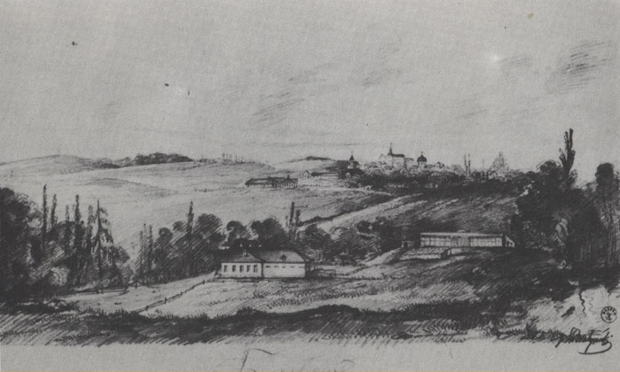 Беларуская (тарашкевіца): Заслаўе